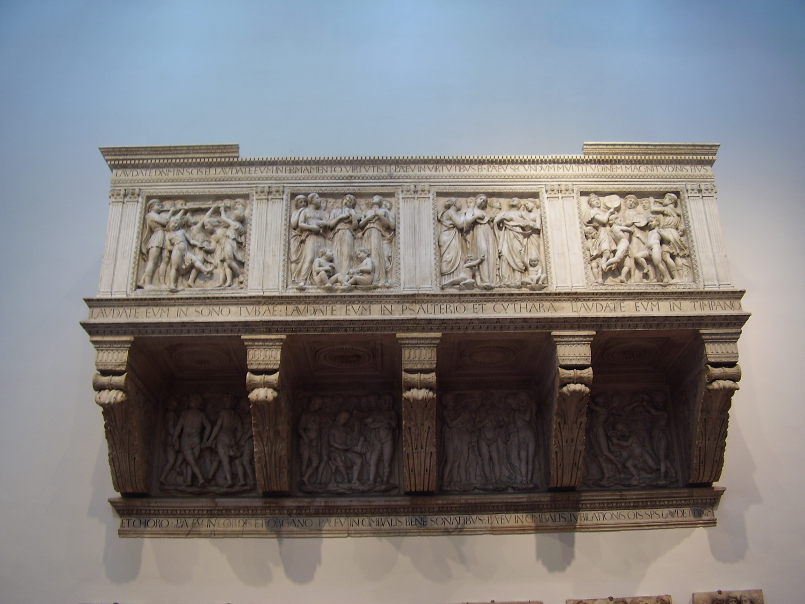 Firenze.